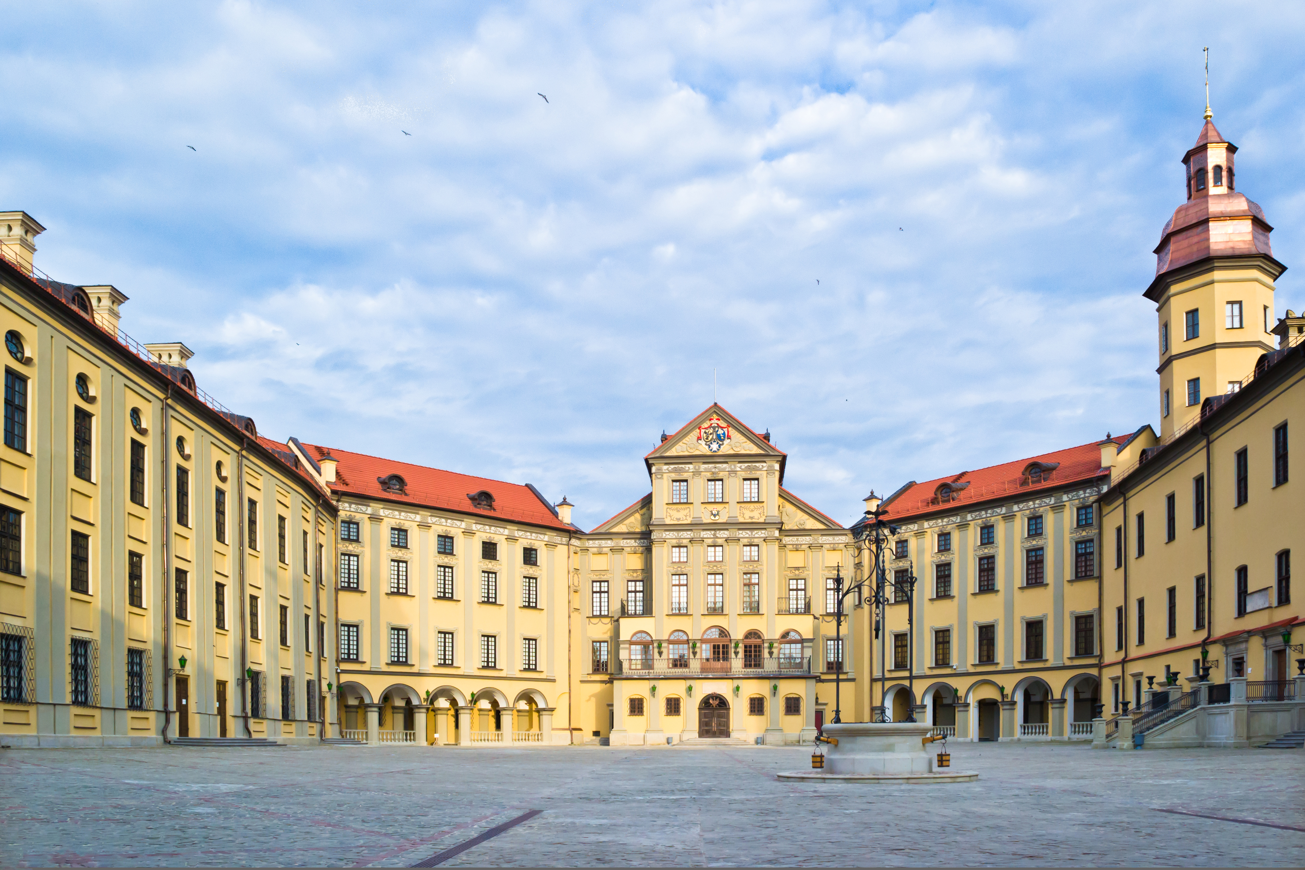 Беларуская (тарашкевіца): Палацава-паркавы ансамбль:замак-палац, паўднёвая і ўсходняя галерэі, камяніца, арсэнал з капліцай, брама, два прыбрамныя корпусы, паўночна-ўсходняя і паўднёва-заходняя галерэі, лядоўня, стайня;абарончыя збудаваньні і мост;тэрыторыя паркаў:Замкавы, Стары, Японскі, Ангельскі, Новы;водная сыстэма:Дзікі, Замкавы, Бэрнардынскі ставы. г. Нясьвіж This is a photo of Belarusian heritage monument. Reference number: 610Г000466 ( WLM)